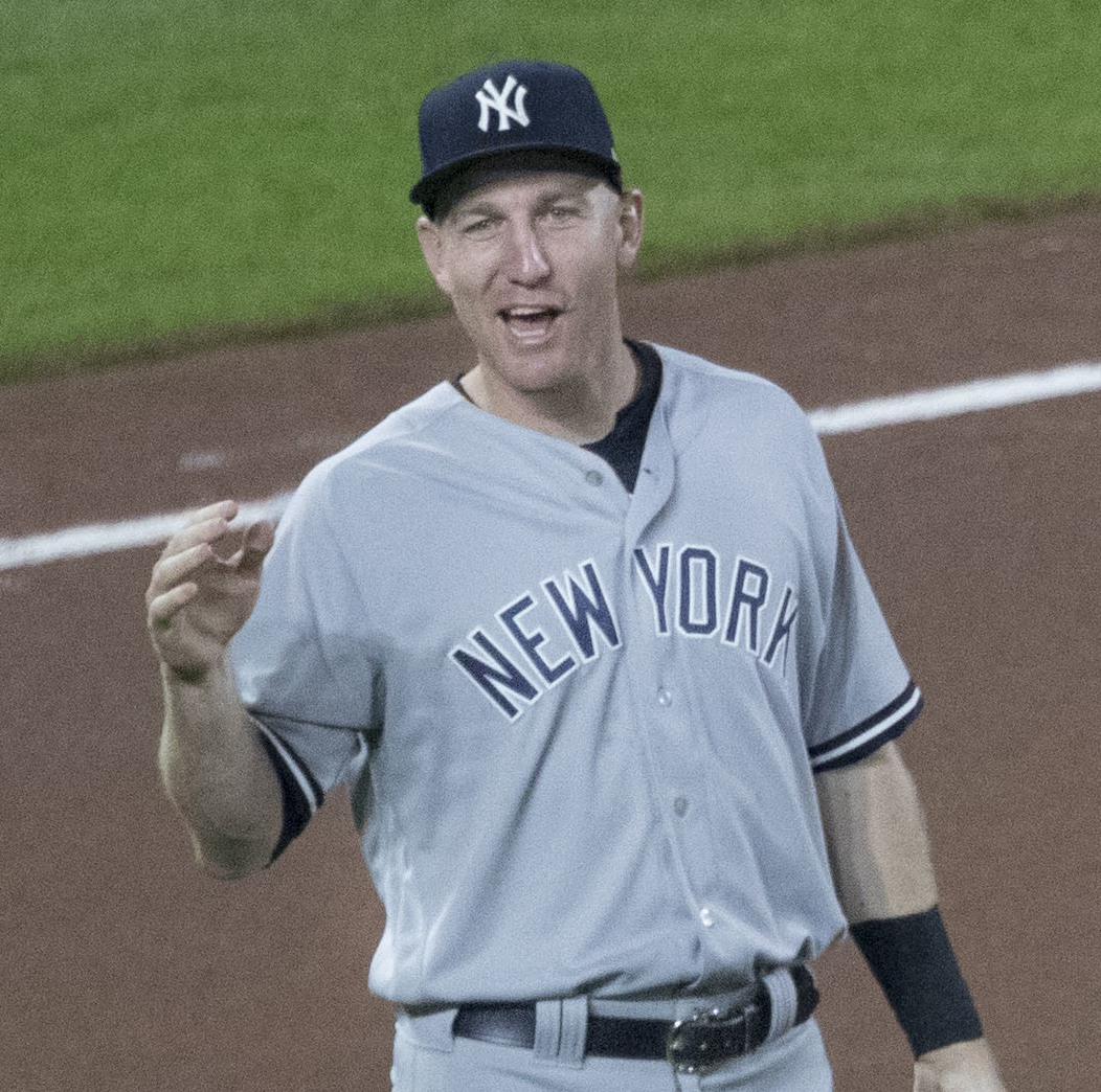 Yankees at Orioles 9/5/17